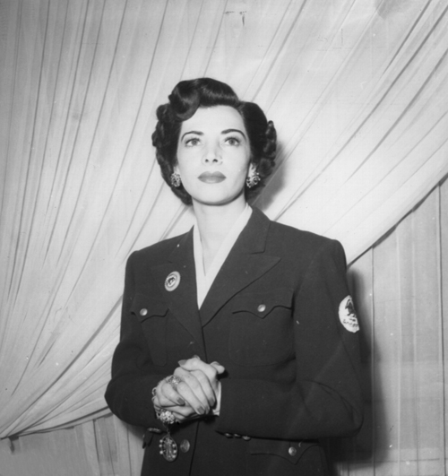 La princesse Chams Pahlavi, présidente d'honneur de la société du Lion-et-Soleil Rouge iranienne, vers 1950